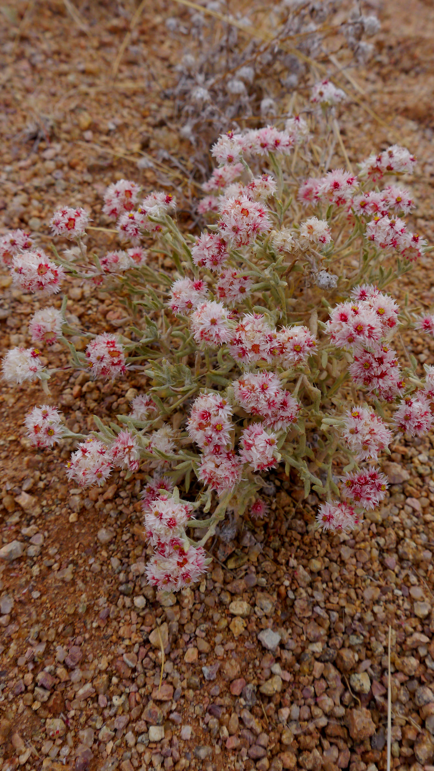 Helichrysum candolleanum en Sesriem (Namibia).